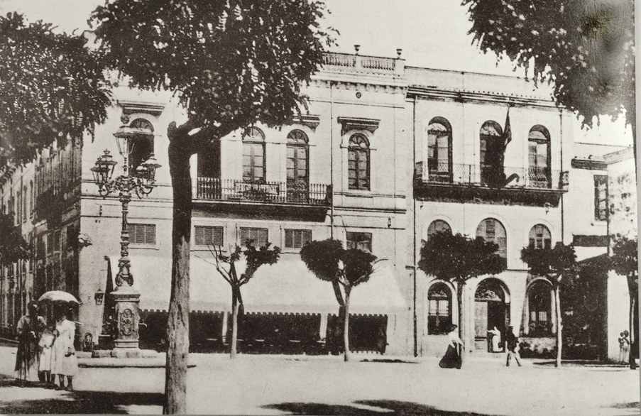 Imatge del Centre Fraternal com a cinema (fons Jaume Ferrer Massanet (Palafrugell, 1832- 1922))